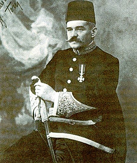 Slika Antona Laščaka.